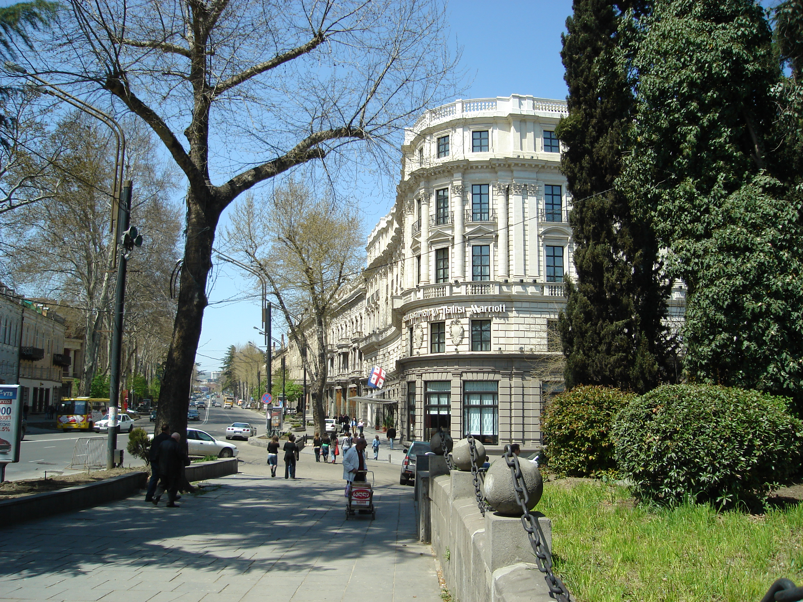 Hotel Tbilisi Marriott in Rustaveli Avenue